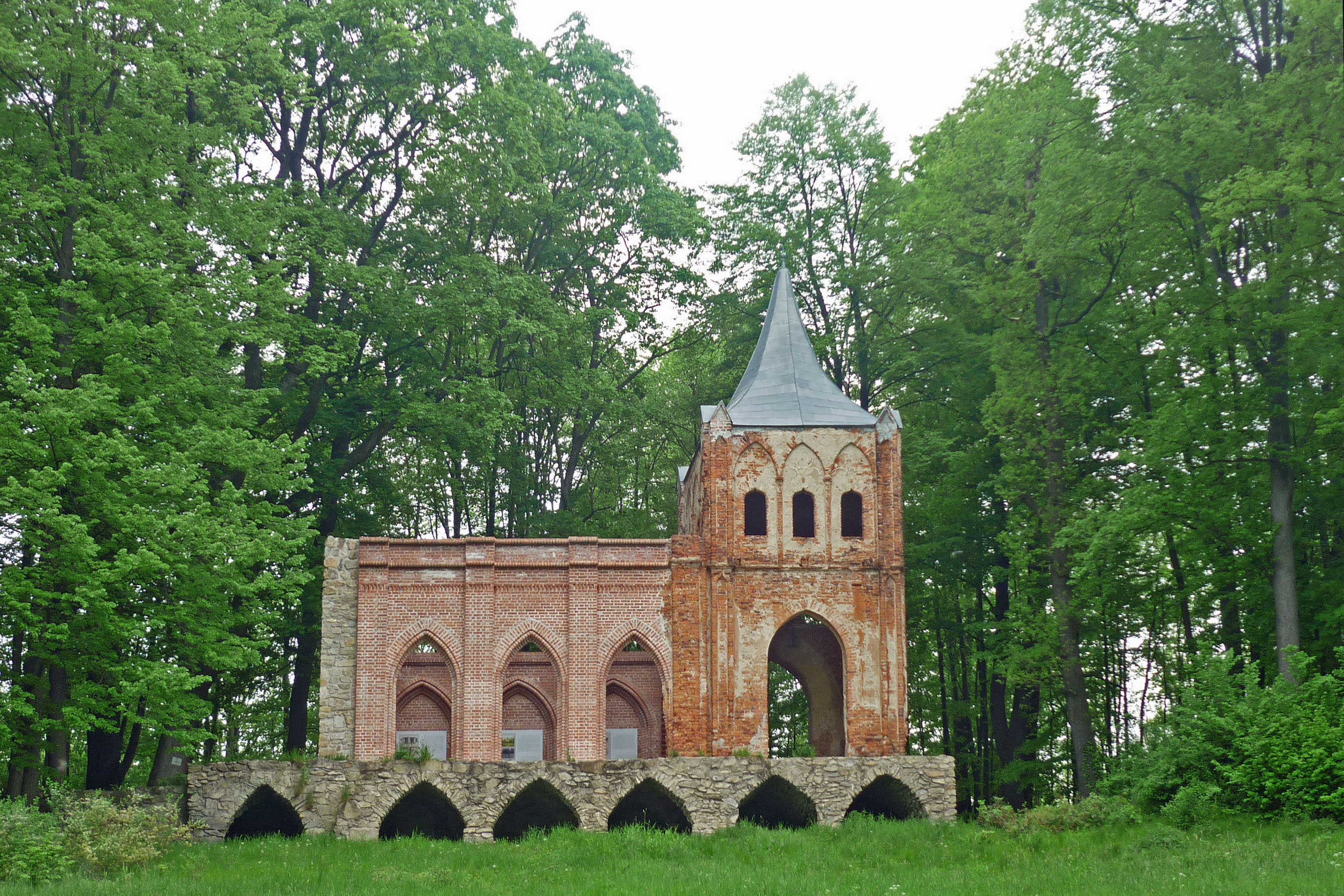 Schloss- und Parkanlage Buchwald (Bukowiec) im Riesengebirge: Abtei und ehem. Mausoleum der Familie von Reden